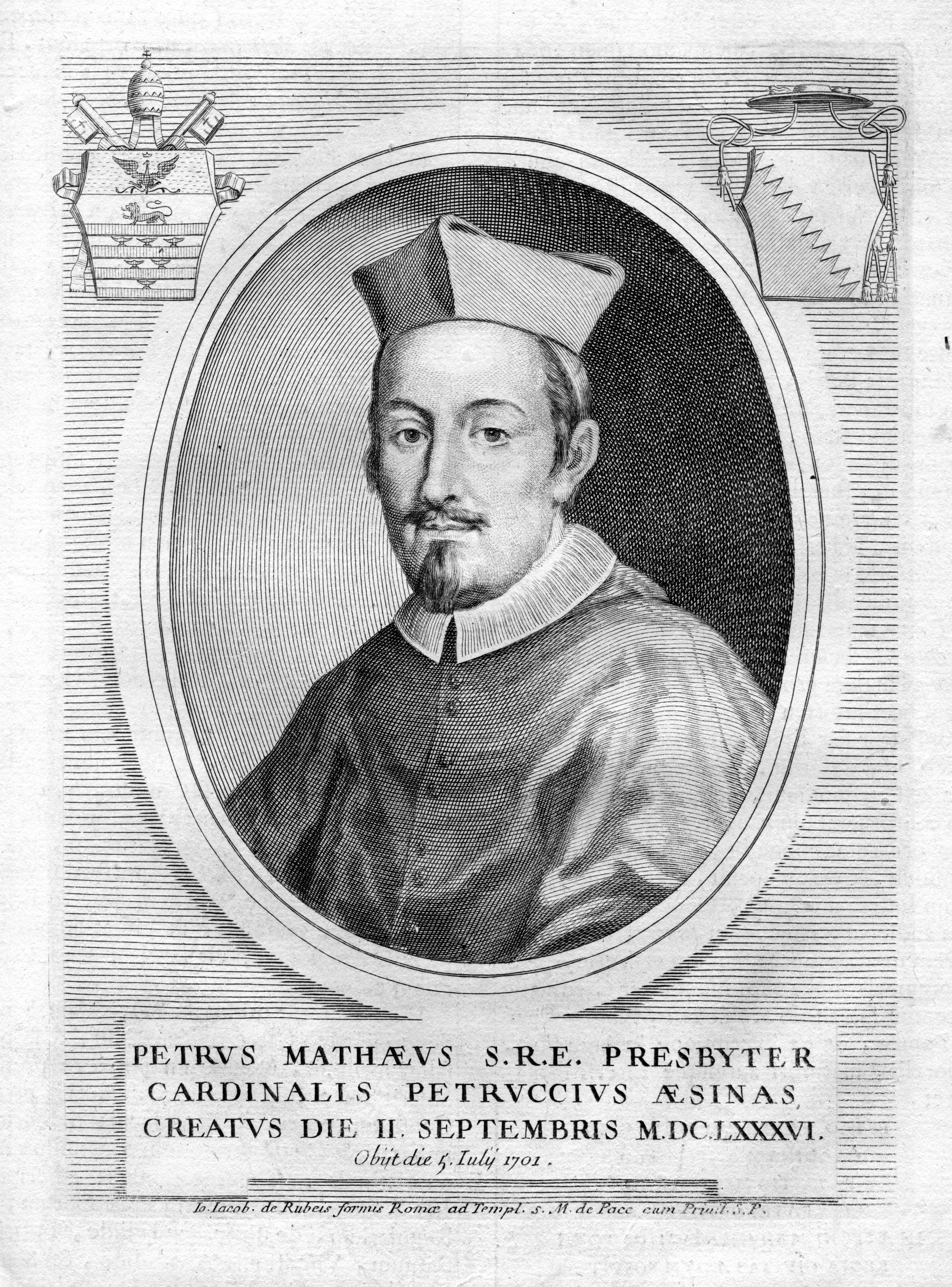 Pier Matteo Petrucci (1636-1701), cardinale italiano